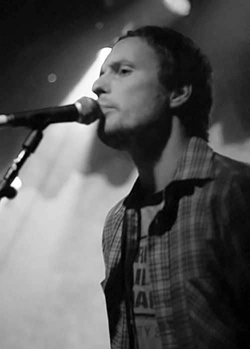 eigen foto /// Hood live op Domino festival in AB, Brussel